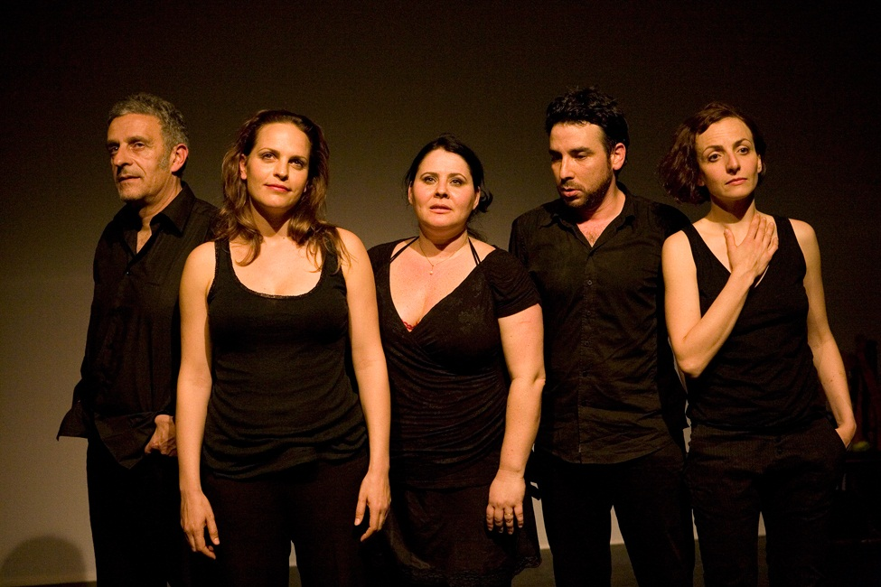 ההצגה איכה